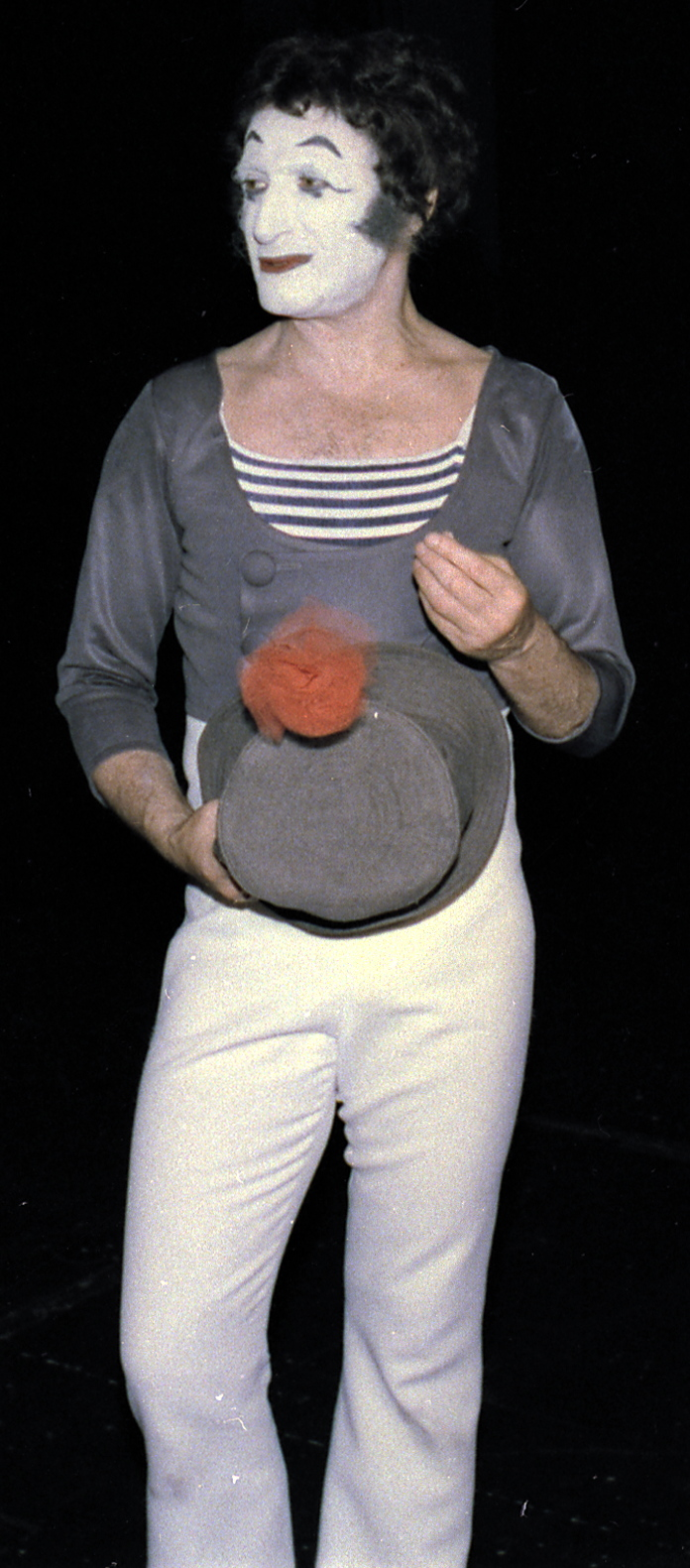 Mime Marcel Marceau, 06/16/1977 ARC Identifier: 175193 NLC-WHSP-C-01769-34